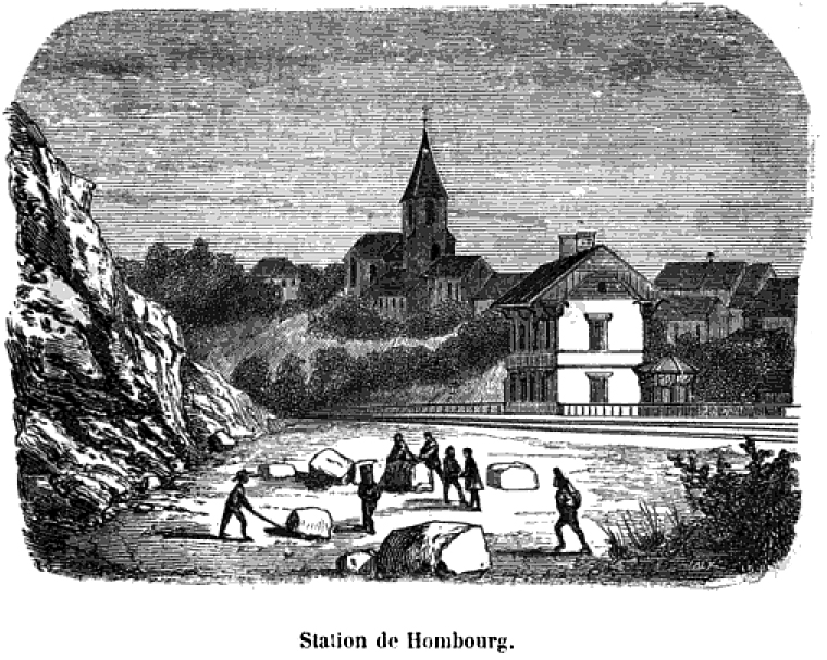 Vignette imprimée "Station de Hombourg", il s'agit de la gare de Hombourg-Haut en 1854. Station située sur l'« embranchement de Frouard à Forbach et à la frontière du Grand-Duché du Bas-Rhin (Prusse) » ouvert le 15 novembre 1851 au trafic voyageurs de Saint-Avold à Forbach.